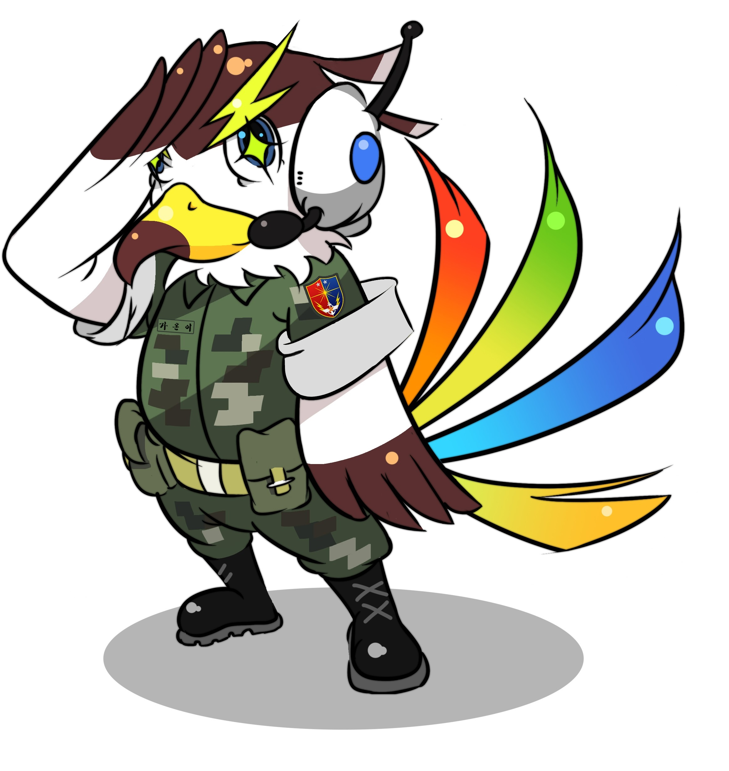 가온이